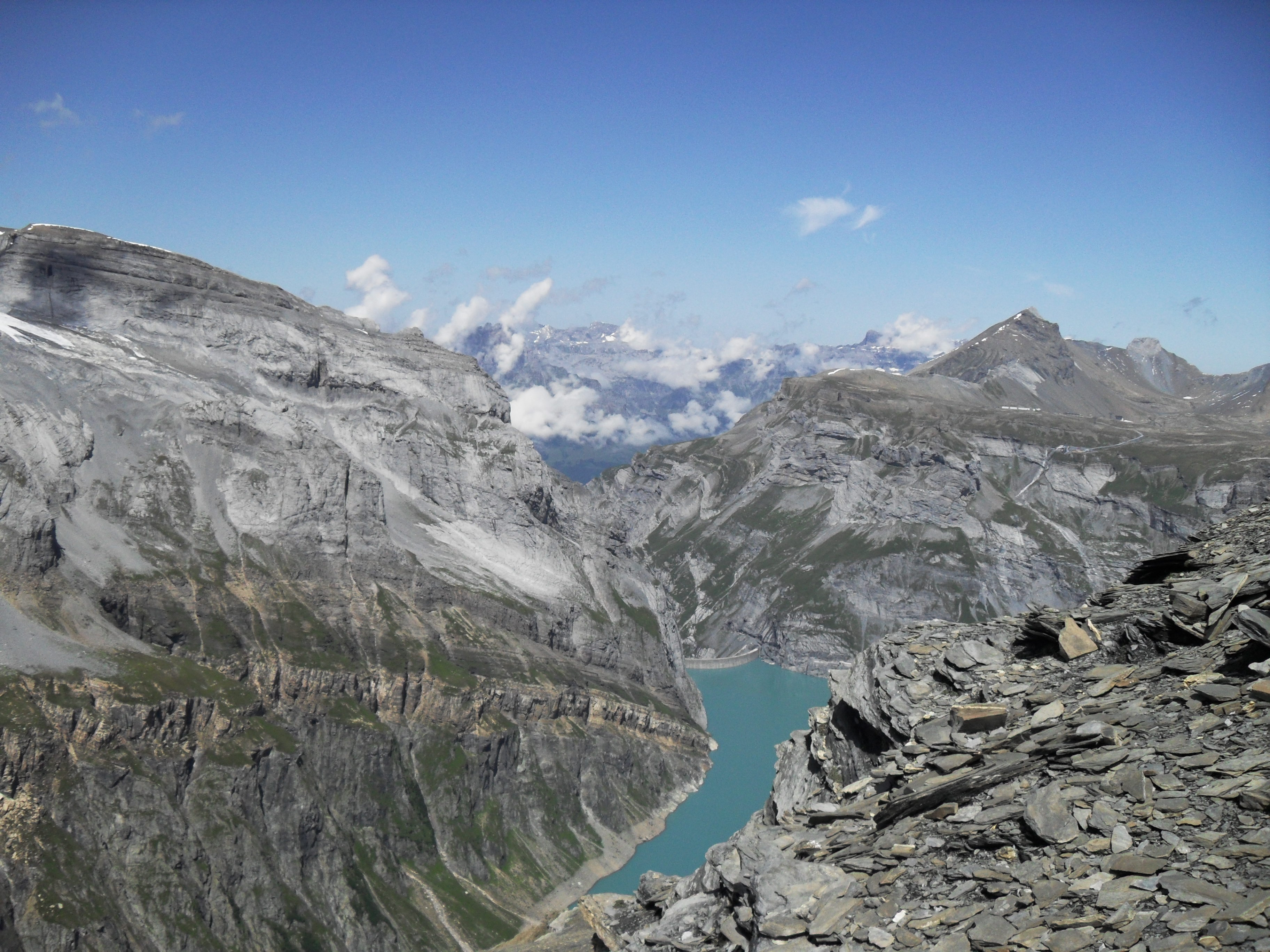 Blick auf den Limmerensee (Kanton Glarus) vom Munt da Rubi , Breil/Brigels Object location46° 49′ 02.6″ N, 9° 01′ 11.76″ E